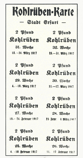 Kohlrübenkarte Stadt Erfurt, 1917